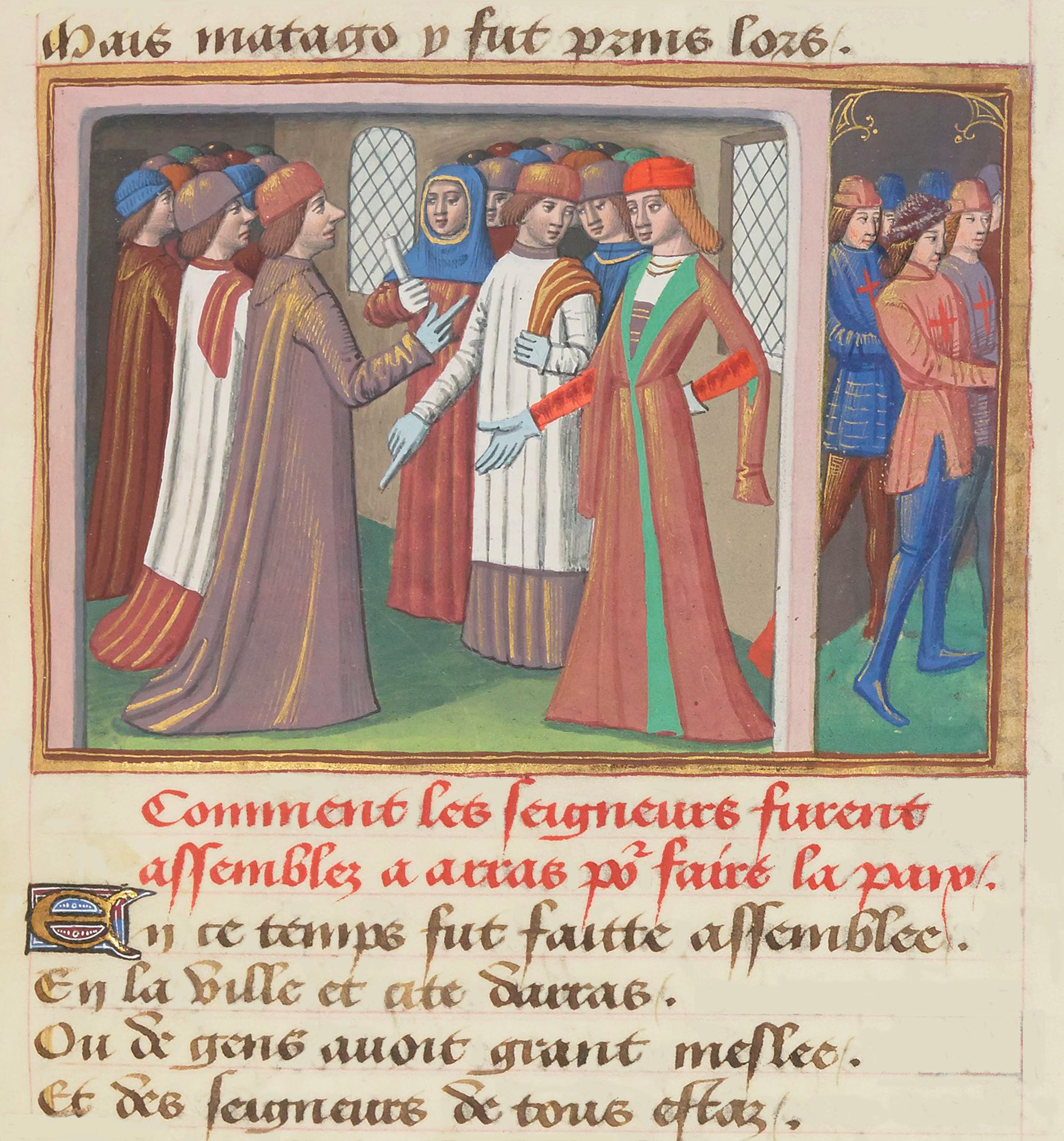 Conférences d'Arras (1435). Enluminure du manuscrit de Martial d'Auvergne, Les Vigiles de Charles VII, vers 1484, BnF, Manuscrit Français 5054, enluminure du folio 86 recto.